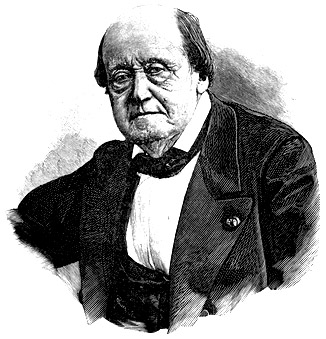 Henri Milne-Edwards. D'après une photographie d'E. Ladrey, graveur inconnu.